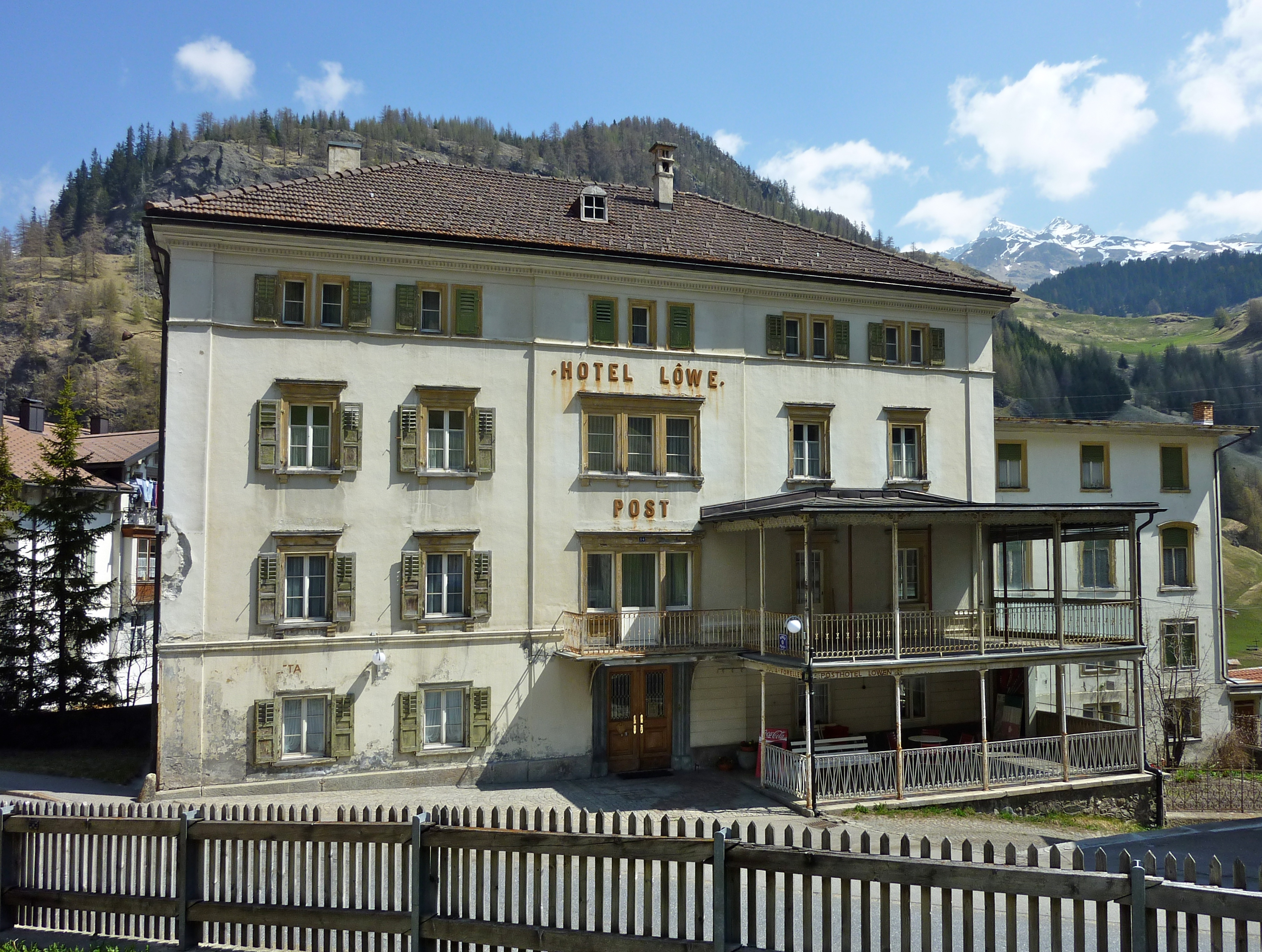 Posthotel Löwen in Mulegns GR Treppenhaus